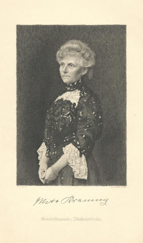 Porträt Mite Kremnitz. Radierung von Johann Lindner mit faksimilierter Unterschrift der Porträtierten